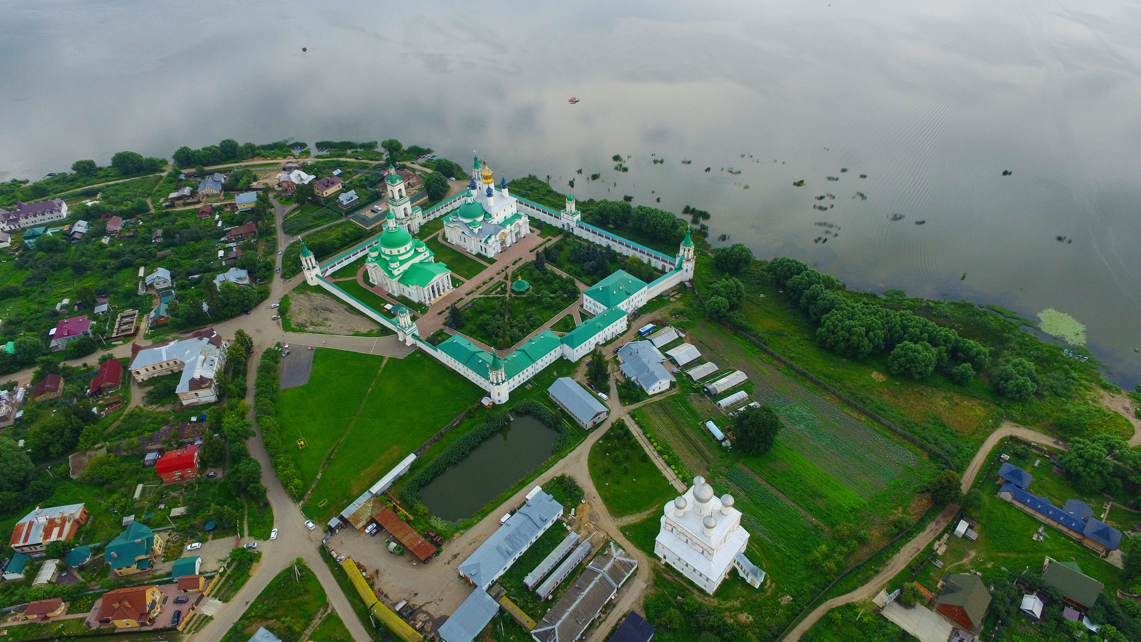 Спасо-Яковлевский Димитриевский мужской монастырь